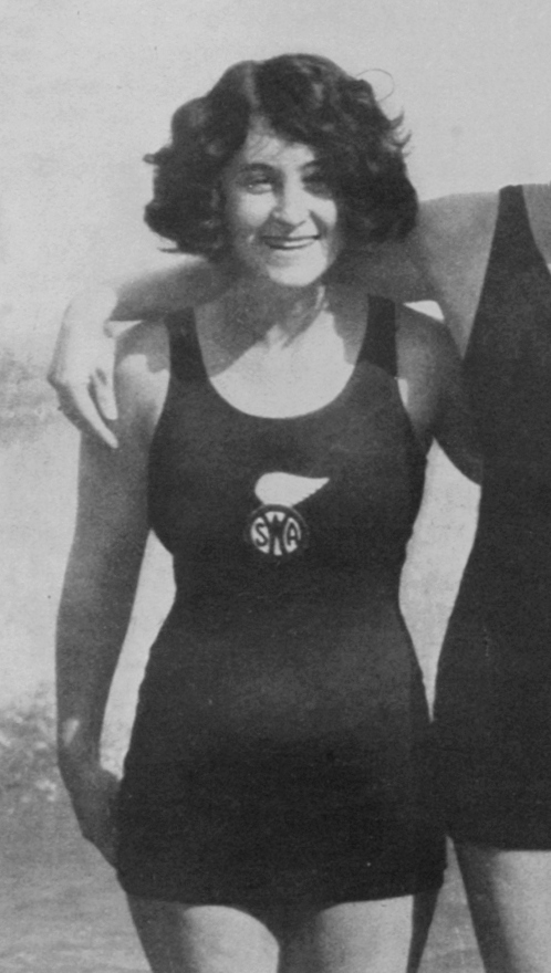 El Grafico del 14 de Marzo de 1925. Edicion 297